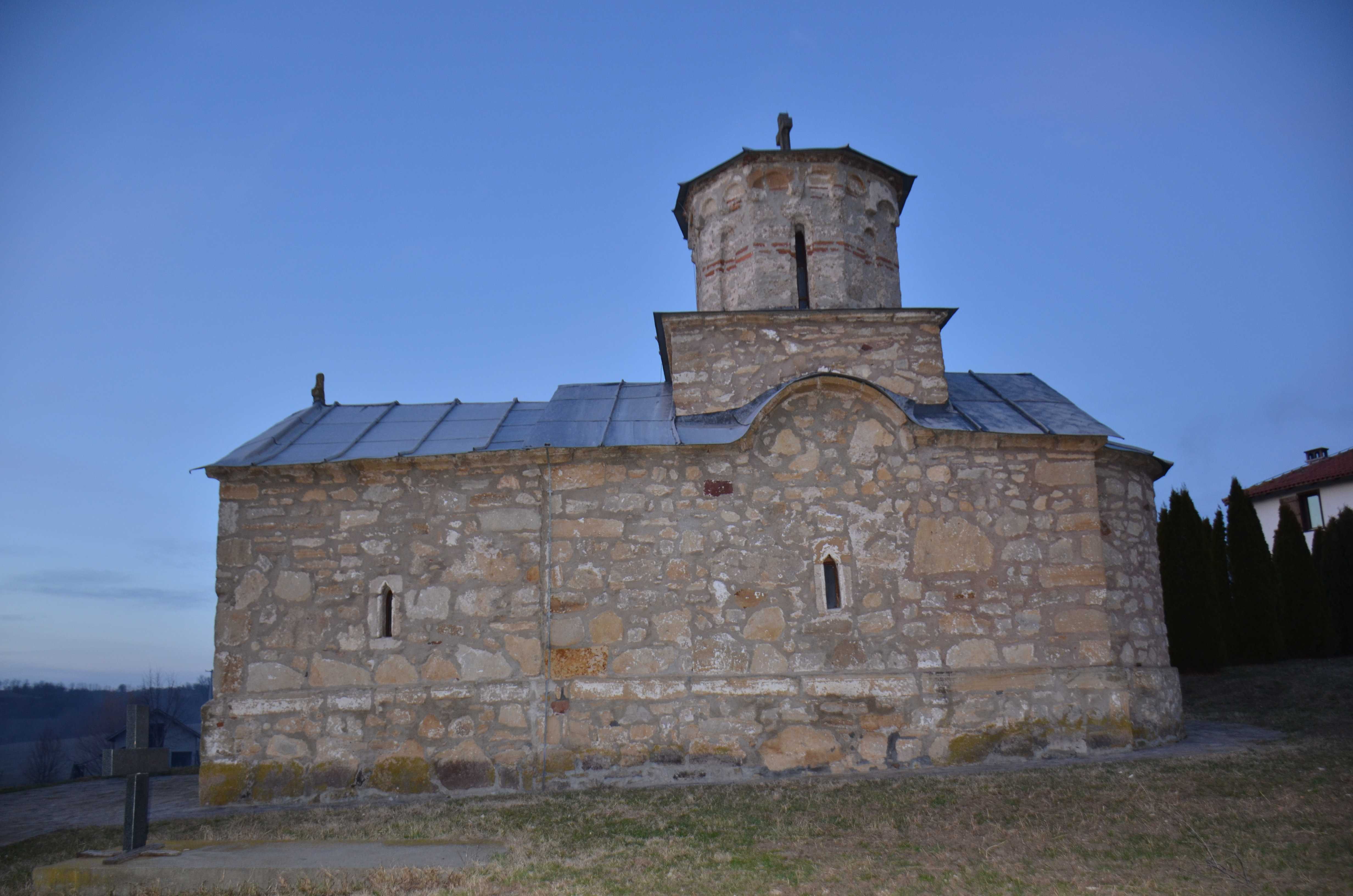 Манастир Рођења Пресвете Богородице - Бела црква, село Бељајка, Општина Деспотовац, Поморавски округ